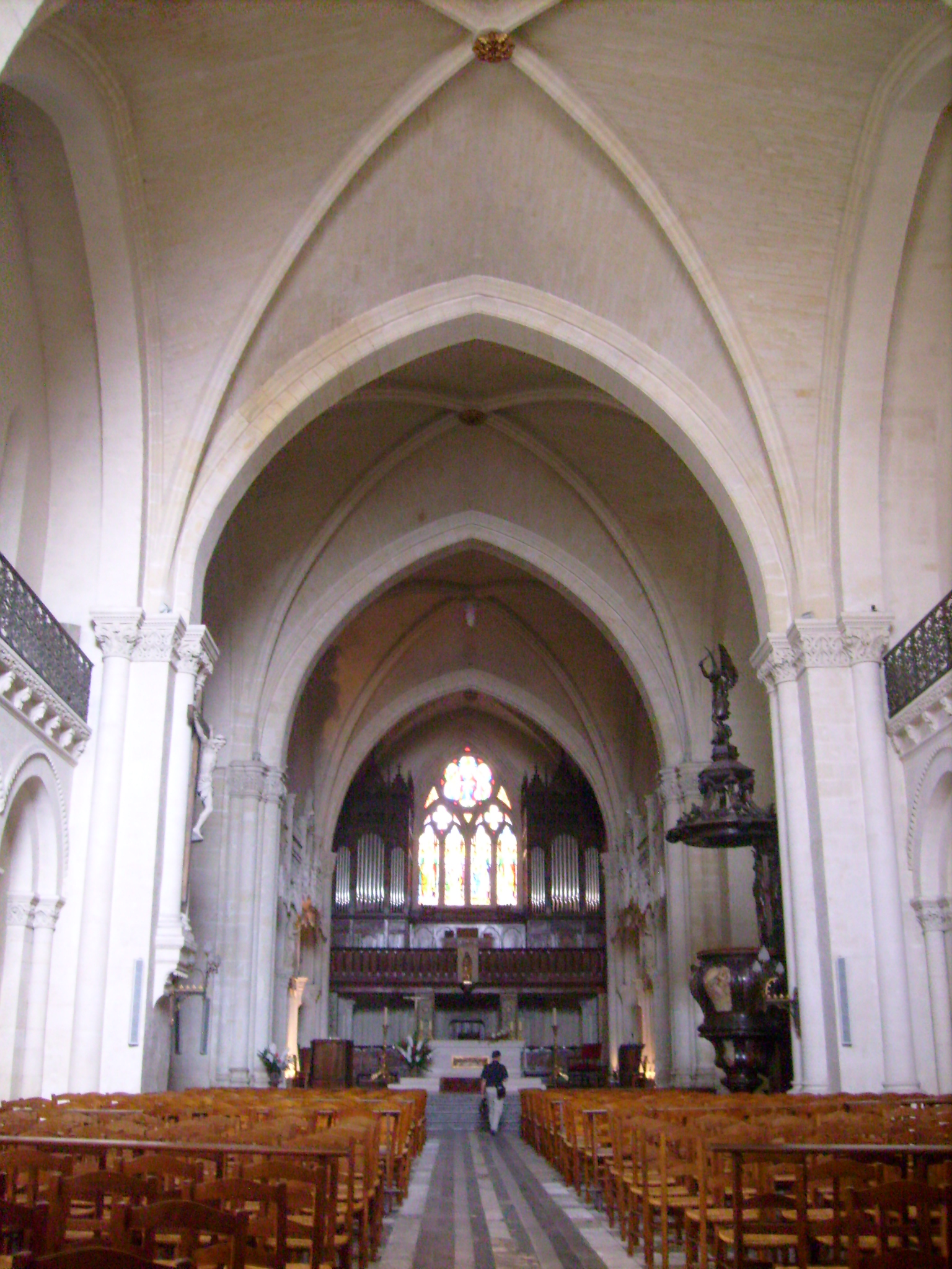 Intérieur de l'église Saint-Léger de Cognac